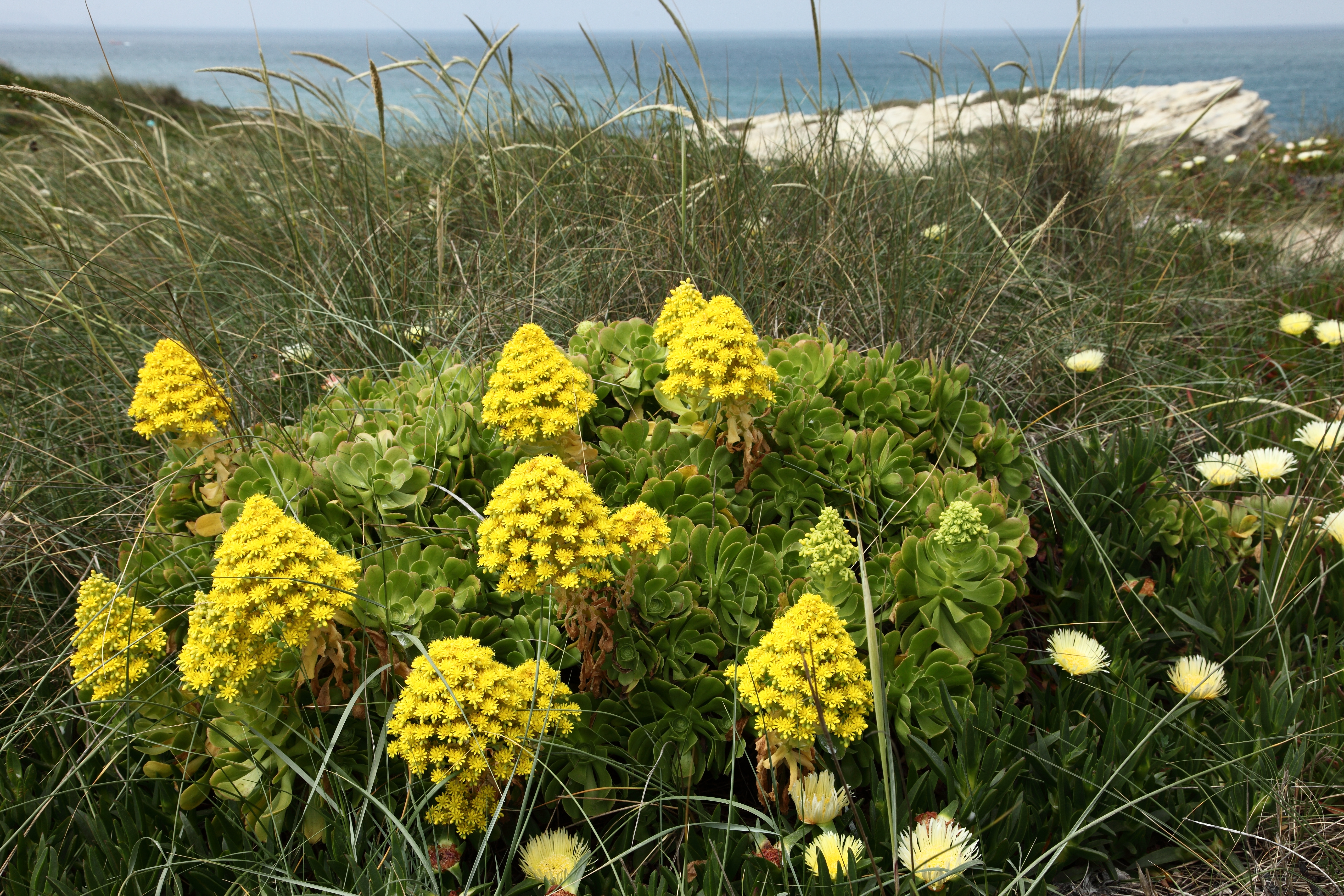 Aeonium arboreum (Peniche-Halbinsel, Portugal, Atlantiküste)